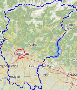 carte réalisée sur umap This map may be incomplete, and may contain errors. Don't rely solely on it for navigation.